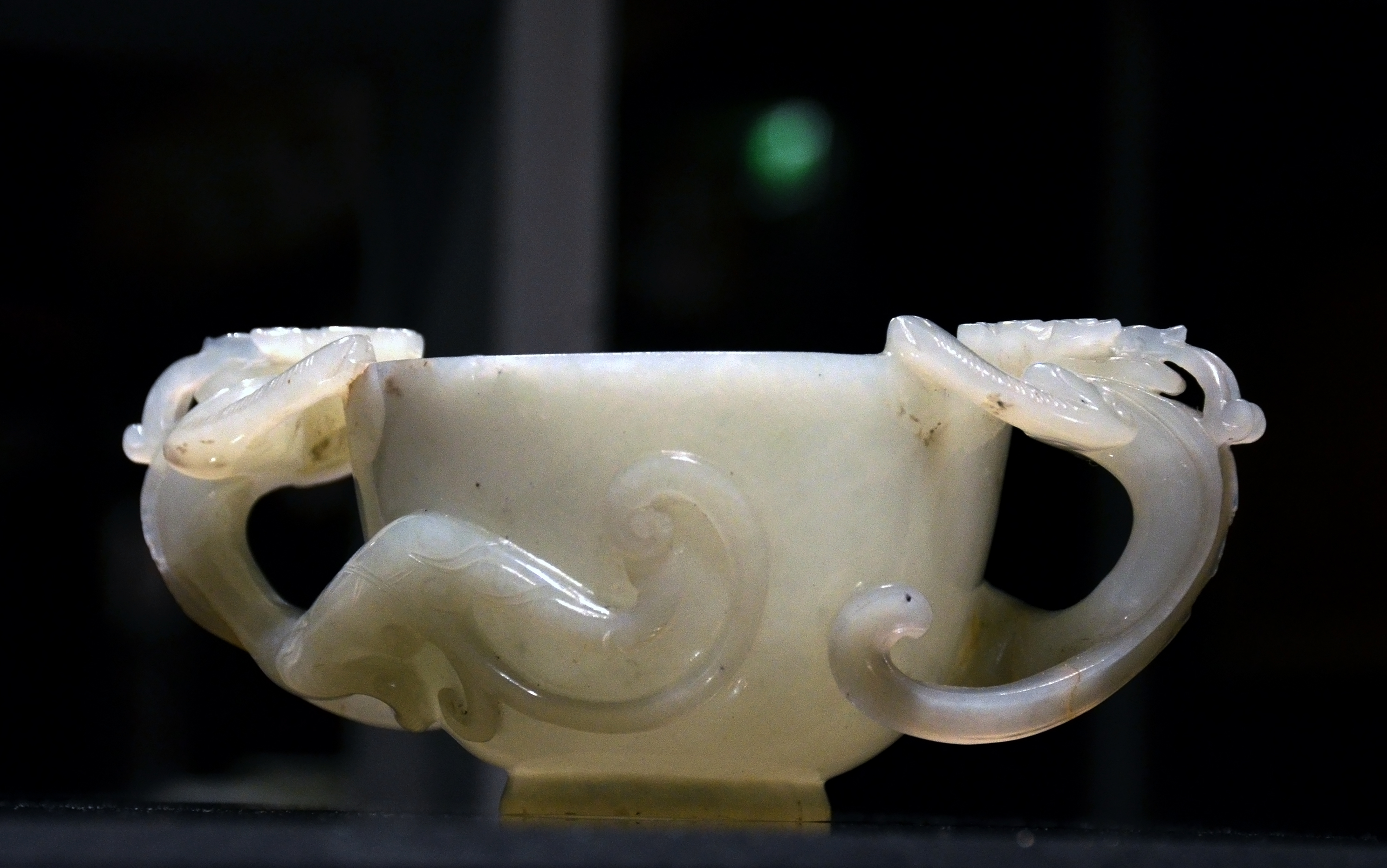 Entrée dans la collection du Cardinal Mazarin entre 1653 et 1661, ensuite dans la collection de Louis XIV. A présent au Musée Guimet (MNAAG).